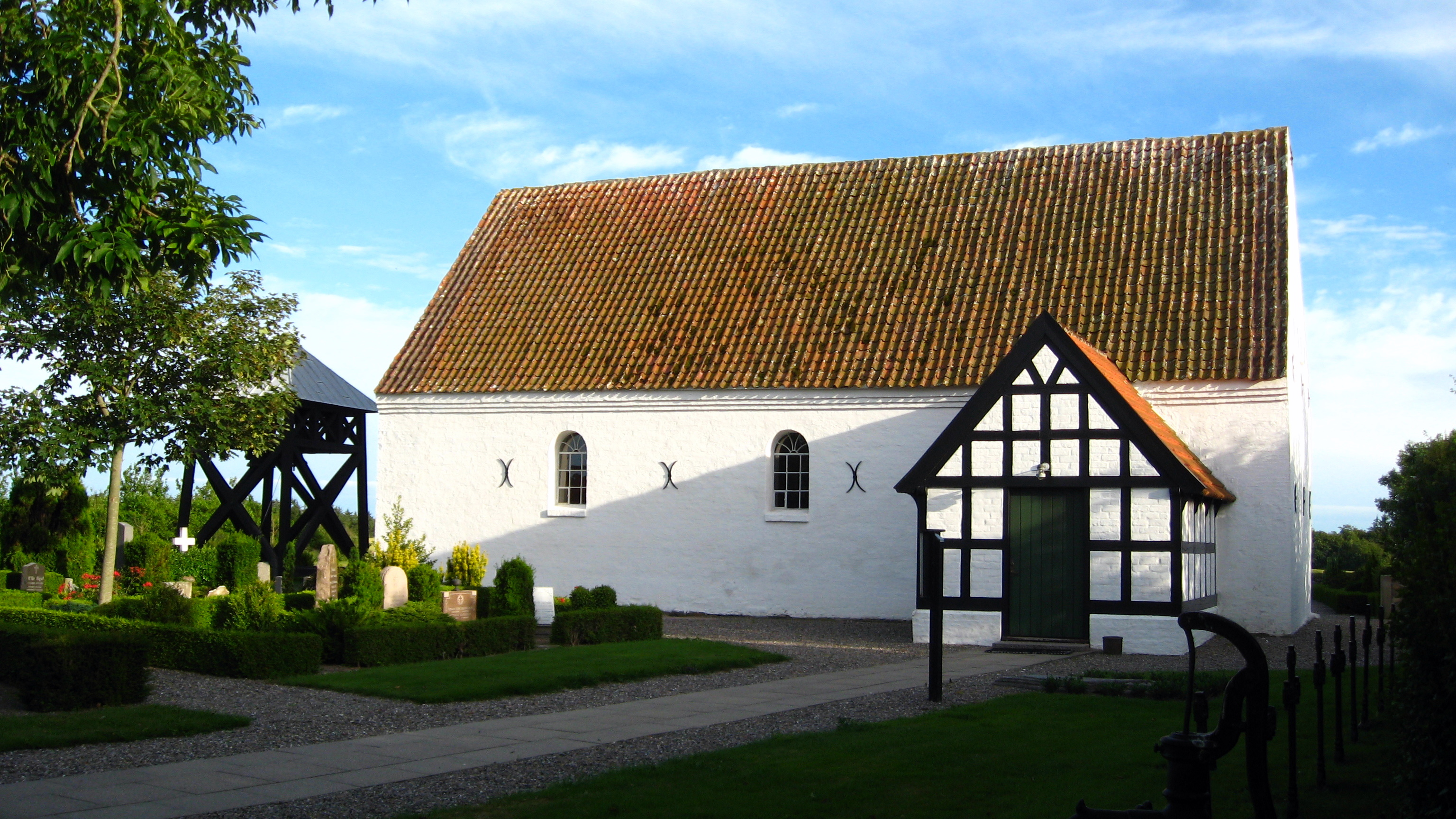 Asdal Kirke, Hjørring Kommune